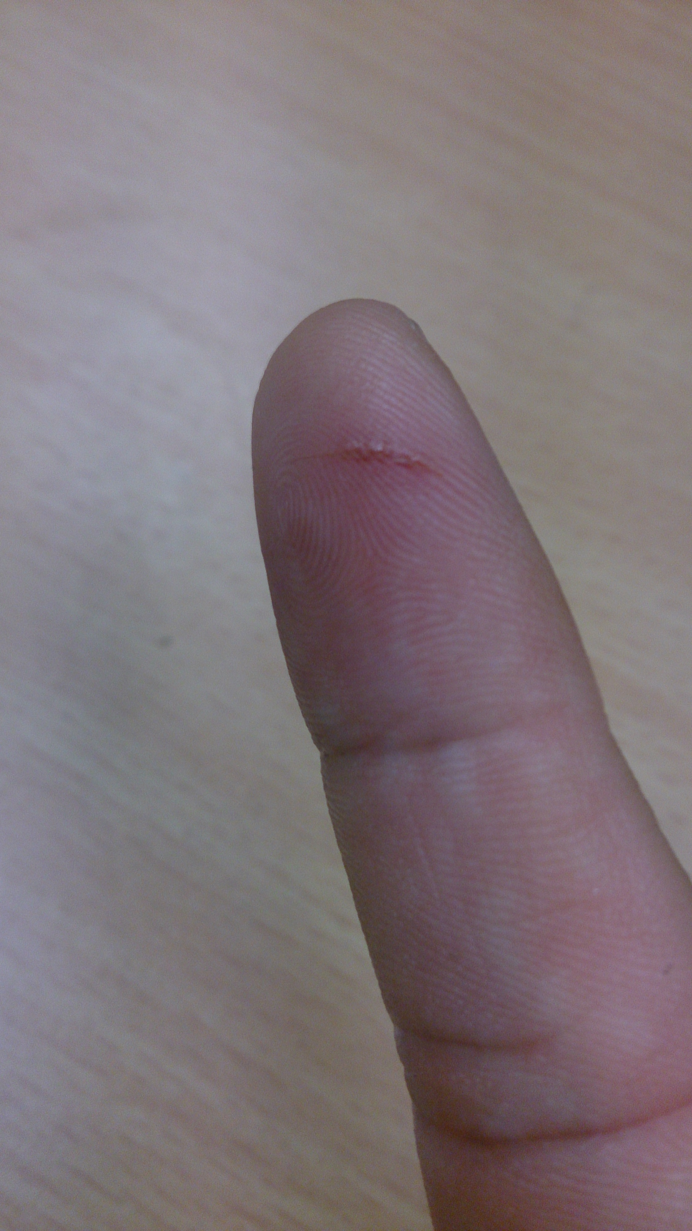 ouch!